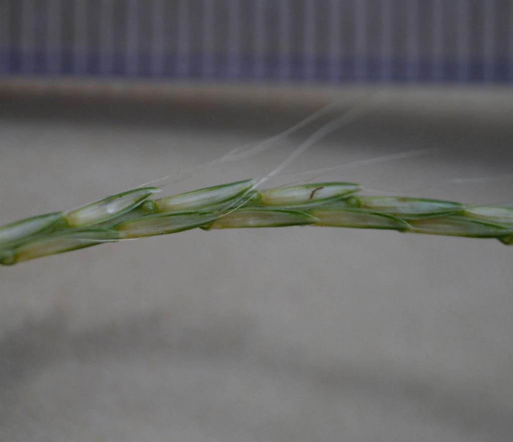 Dimeria ornithopoda(poaceae) カリマタガヤ(イネ科) 2013年10月13日 和歌山県串本町 Kusimoto town, Wakayama pref. Japan